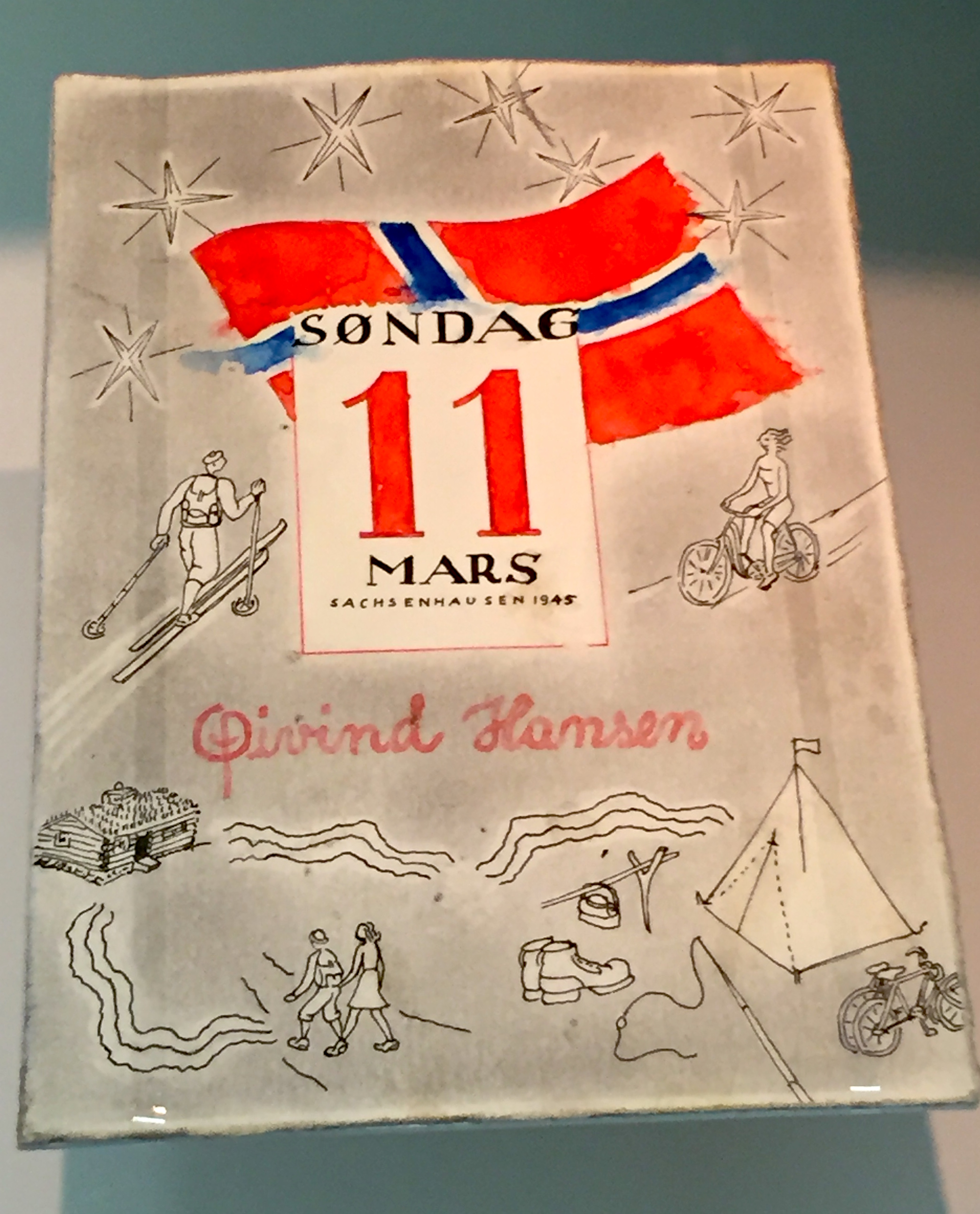 Håndlaget bursdagskort overrakt til Øivind Hansen av norske medfanger. Konsentrasjonsleiren Sachsenhausen, 11. mars 1945. Nå på utstilling ved Sachsenhausen-museet.